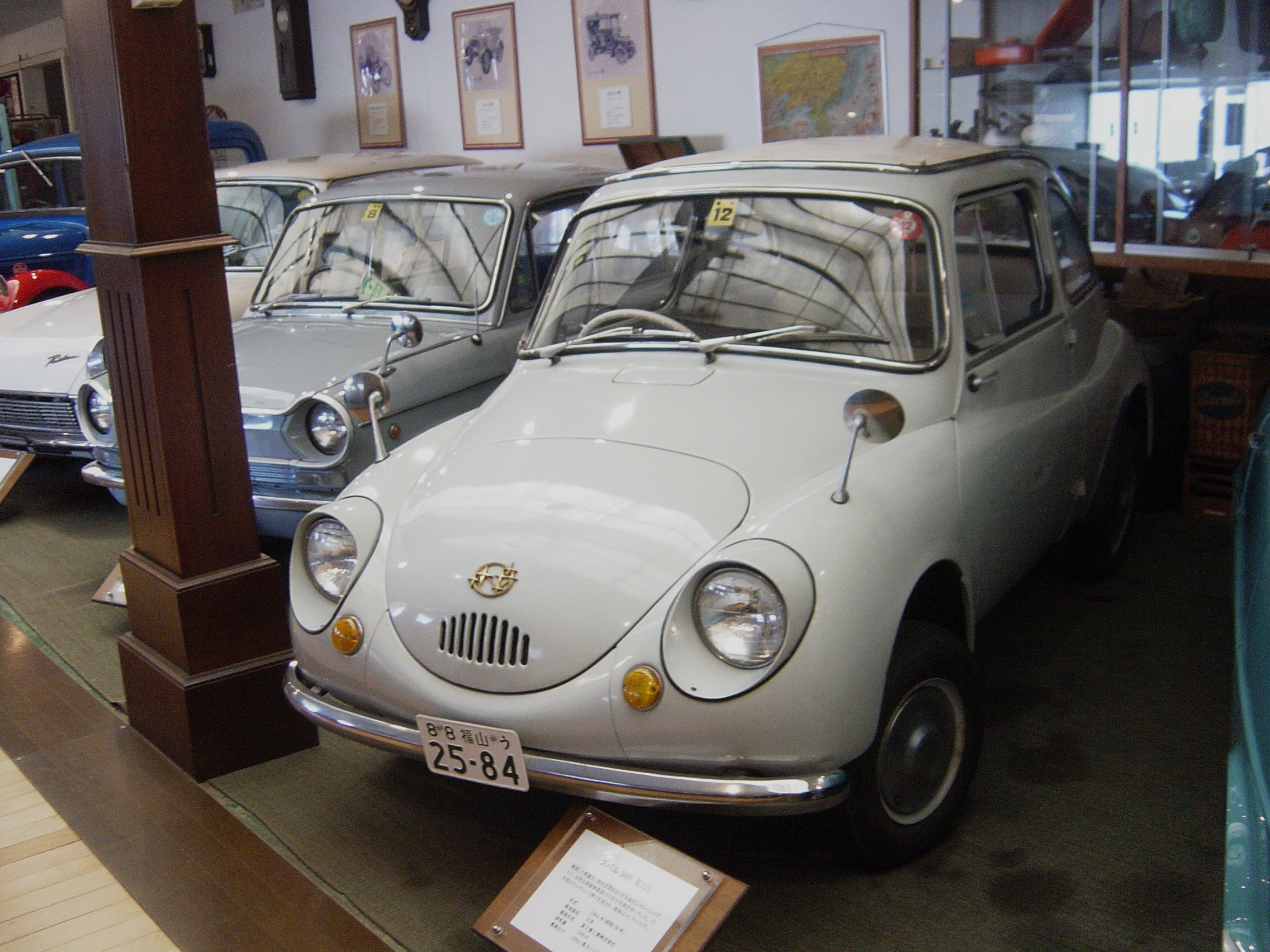 SUBARU 360 (スバル360),Fukuyama MOTOR and CLOCK MUSEUM